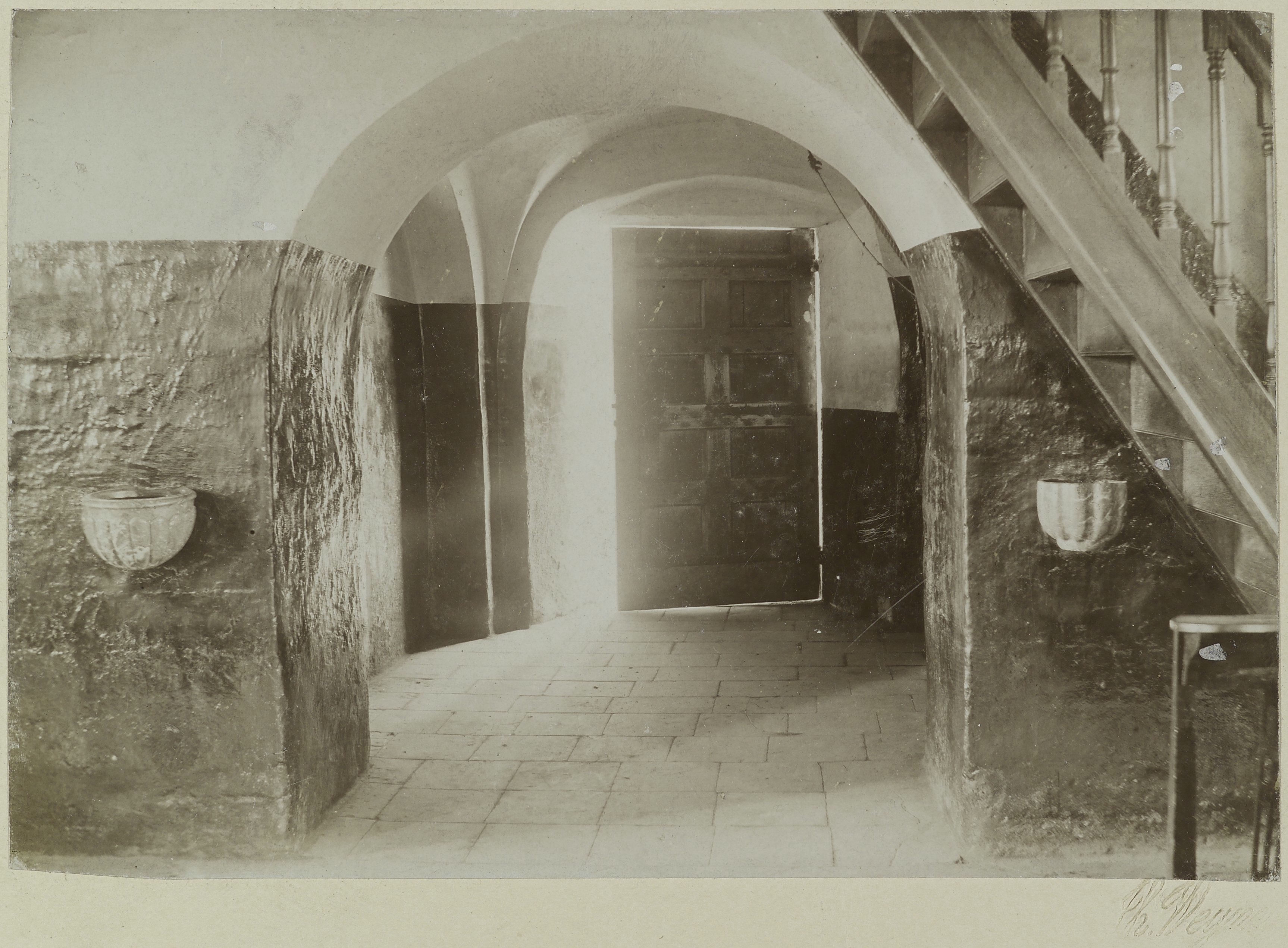 Rooms-Katholieke Kerk: Interieur katholieke kerk: hal (opmerking: Bureau Mulder)